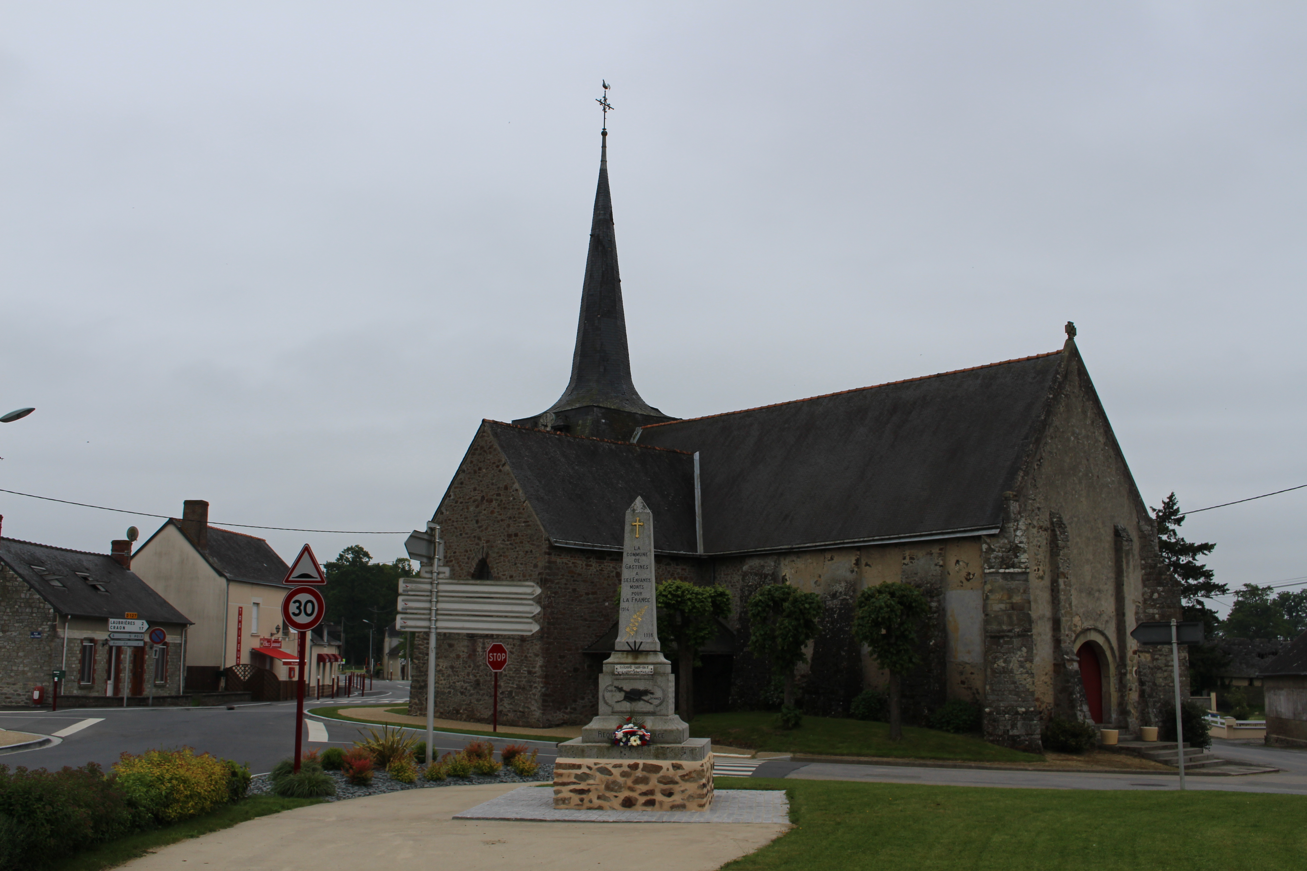 Gastines, Mayenne